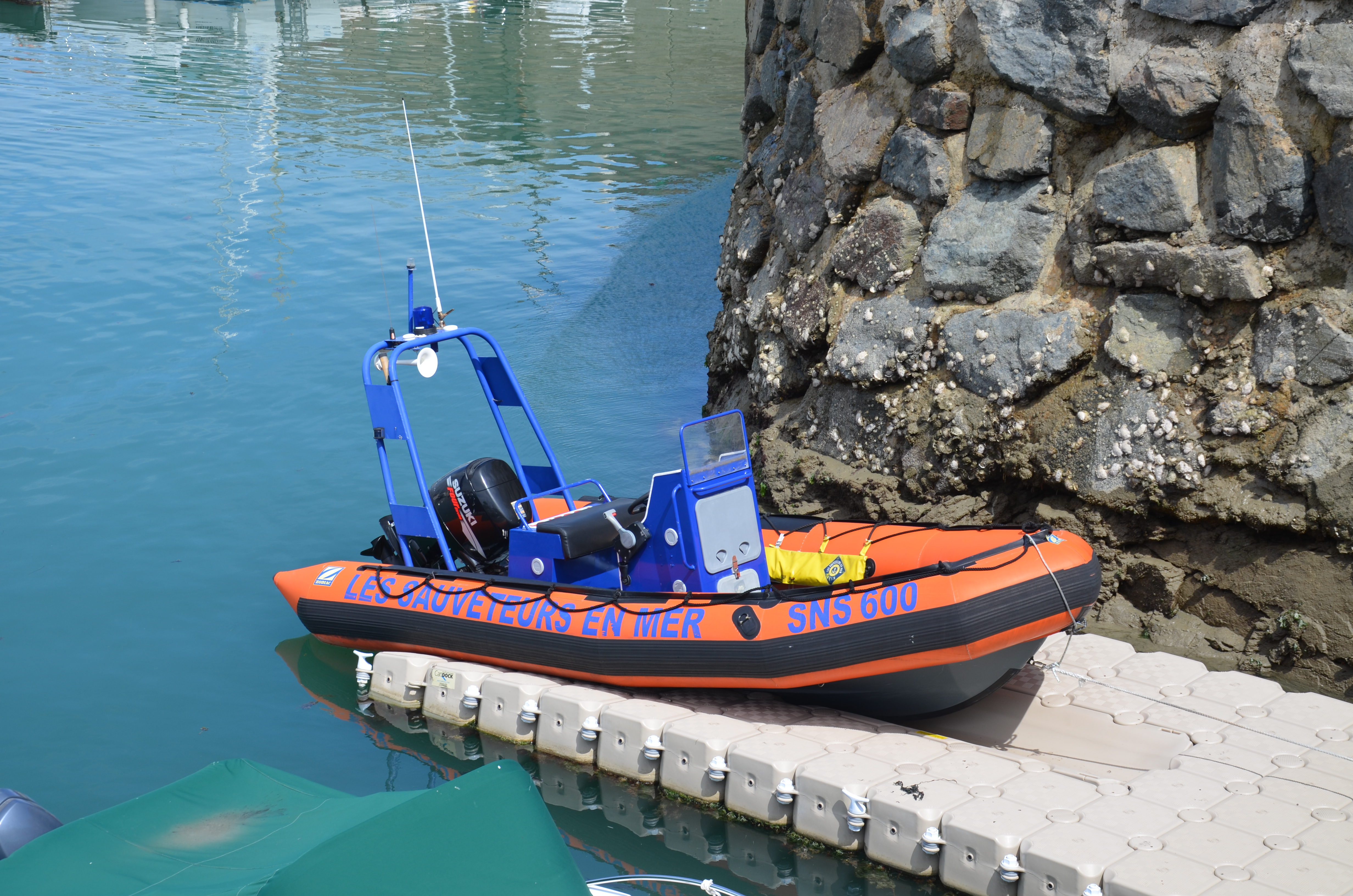 Bateau pneumatique de la Société nationale de sauvetage en mer (SNSM) au port de L'Herbaudière sur l'île de Noirmoutier.